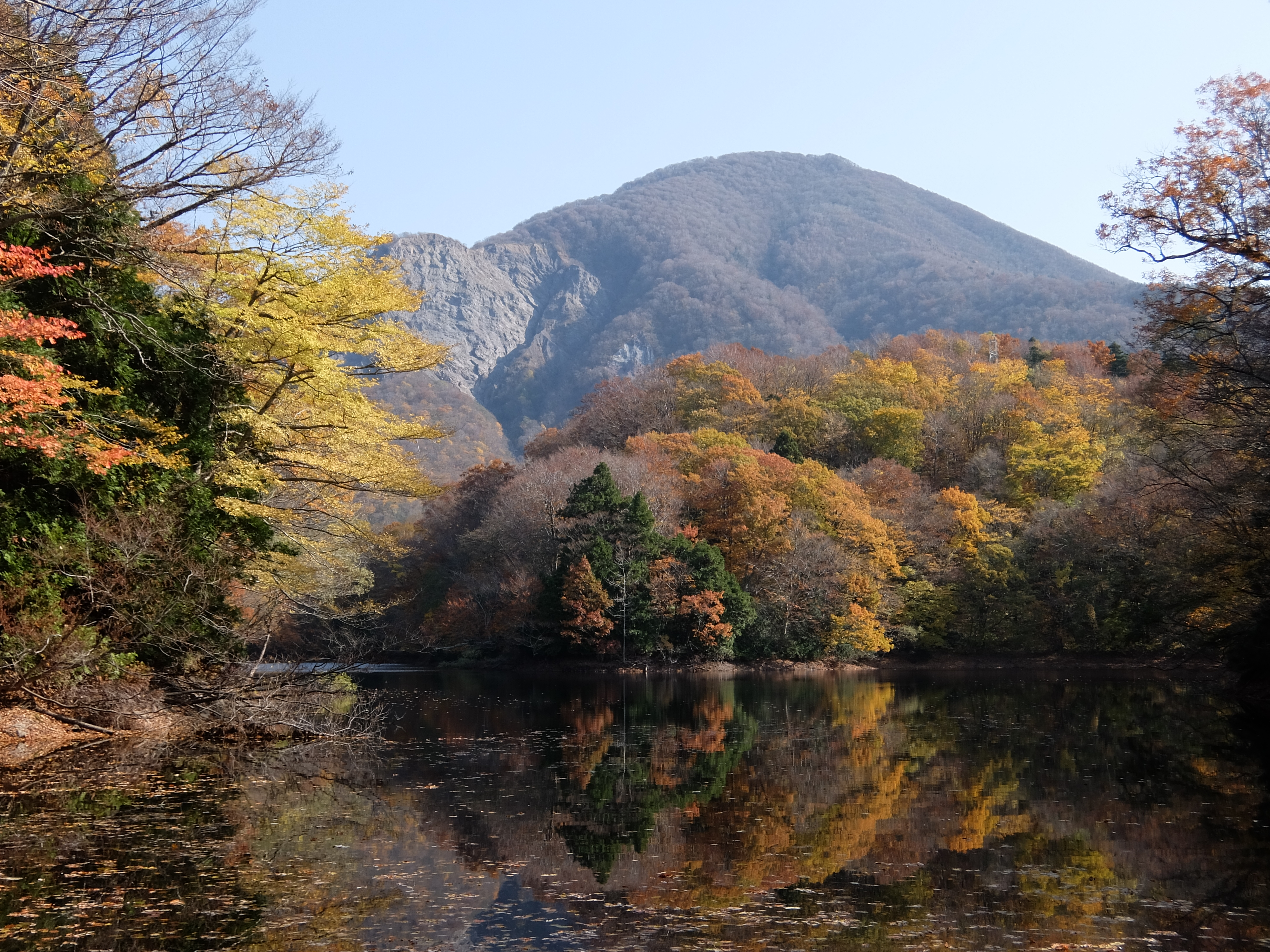 十二湖・糸畑の池から望む崩山